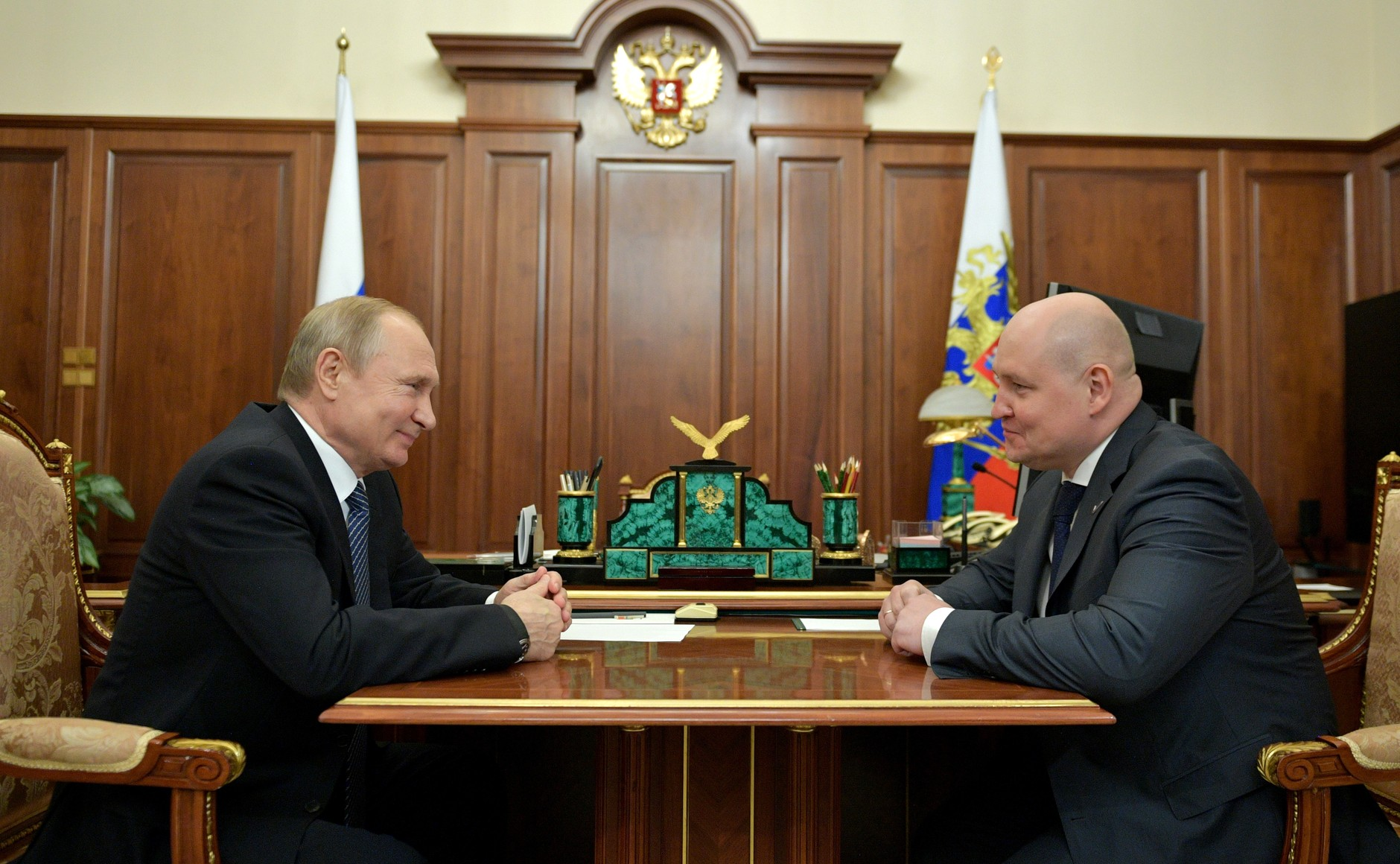 Встреча Президента Российской Федерации Владимира Путина с Михаилом Развожаевым